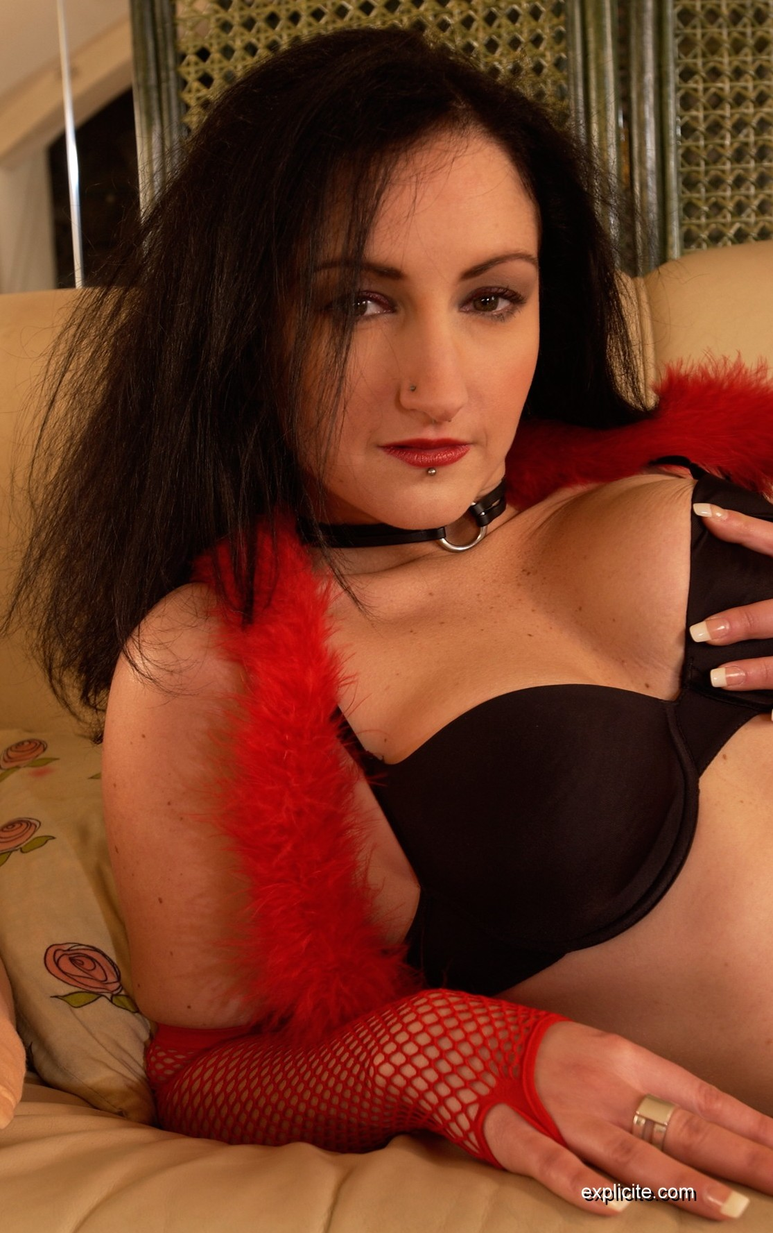 Ana Martin.